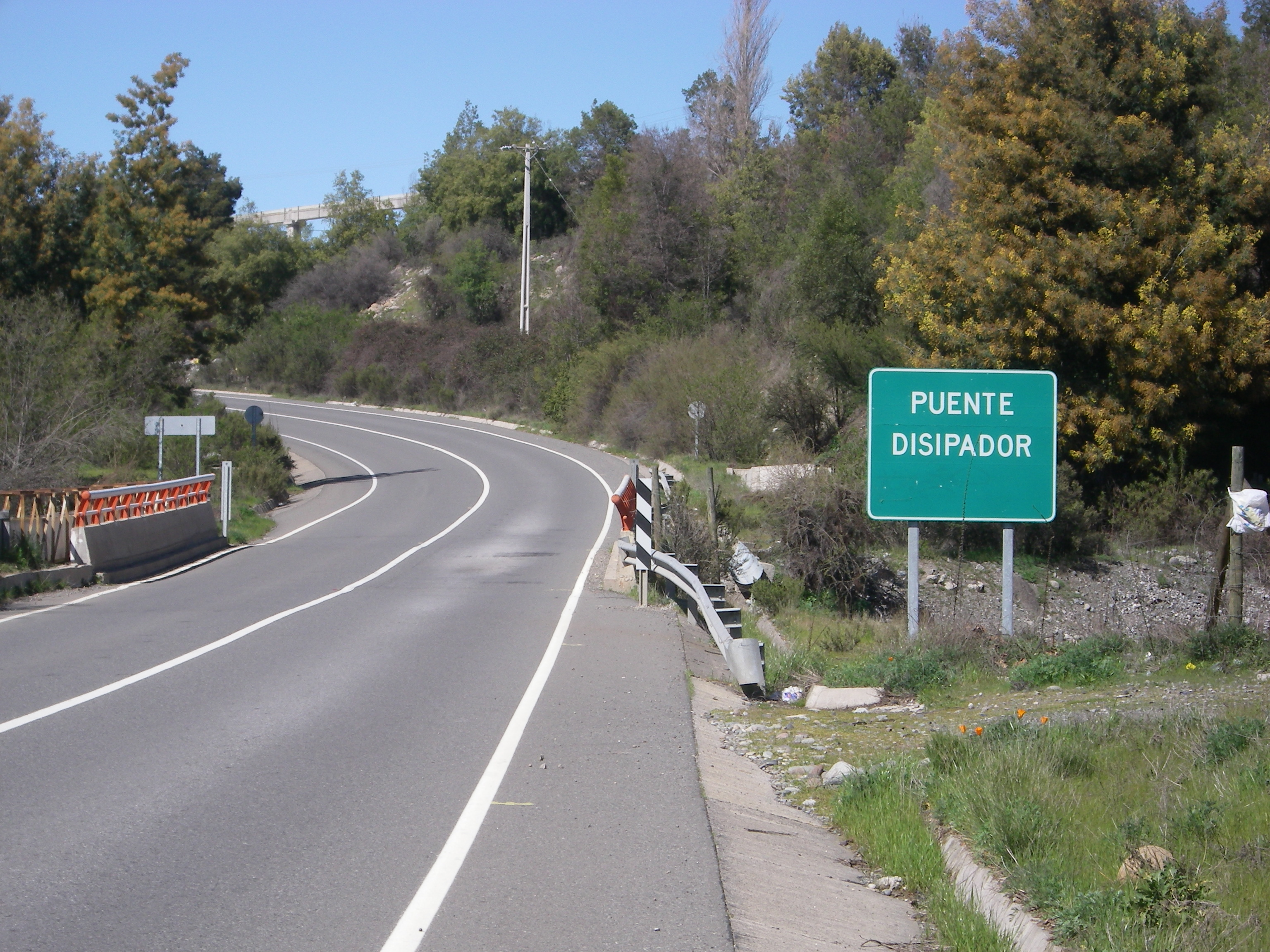 Puente Disipador.